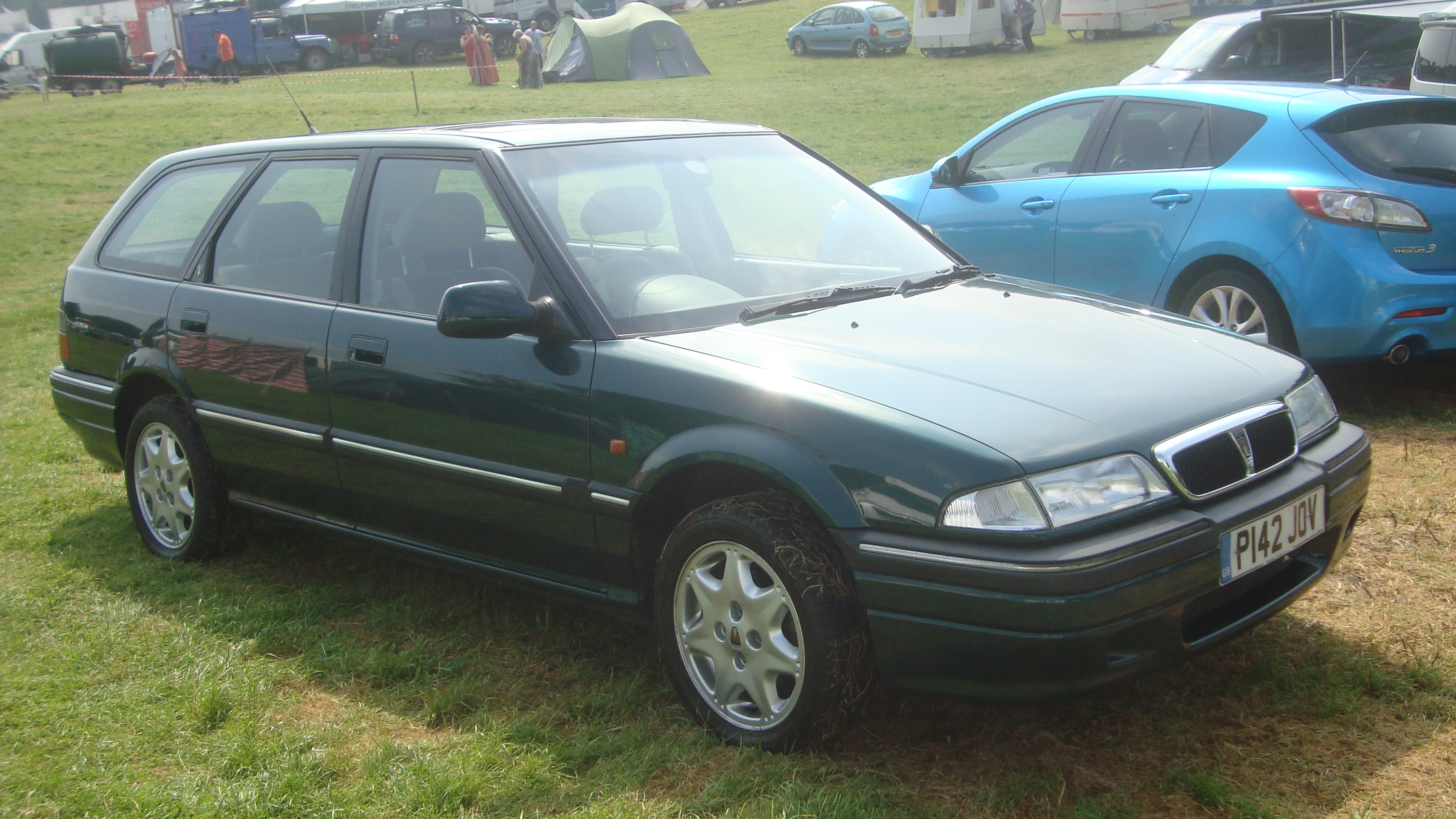 1997 Rover 416 Tourer